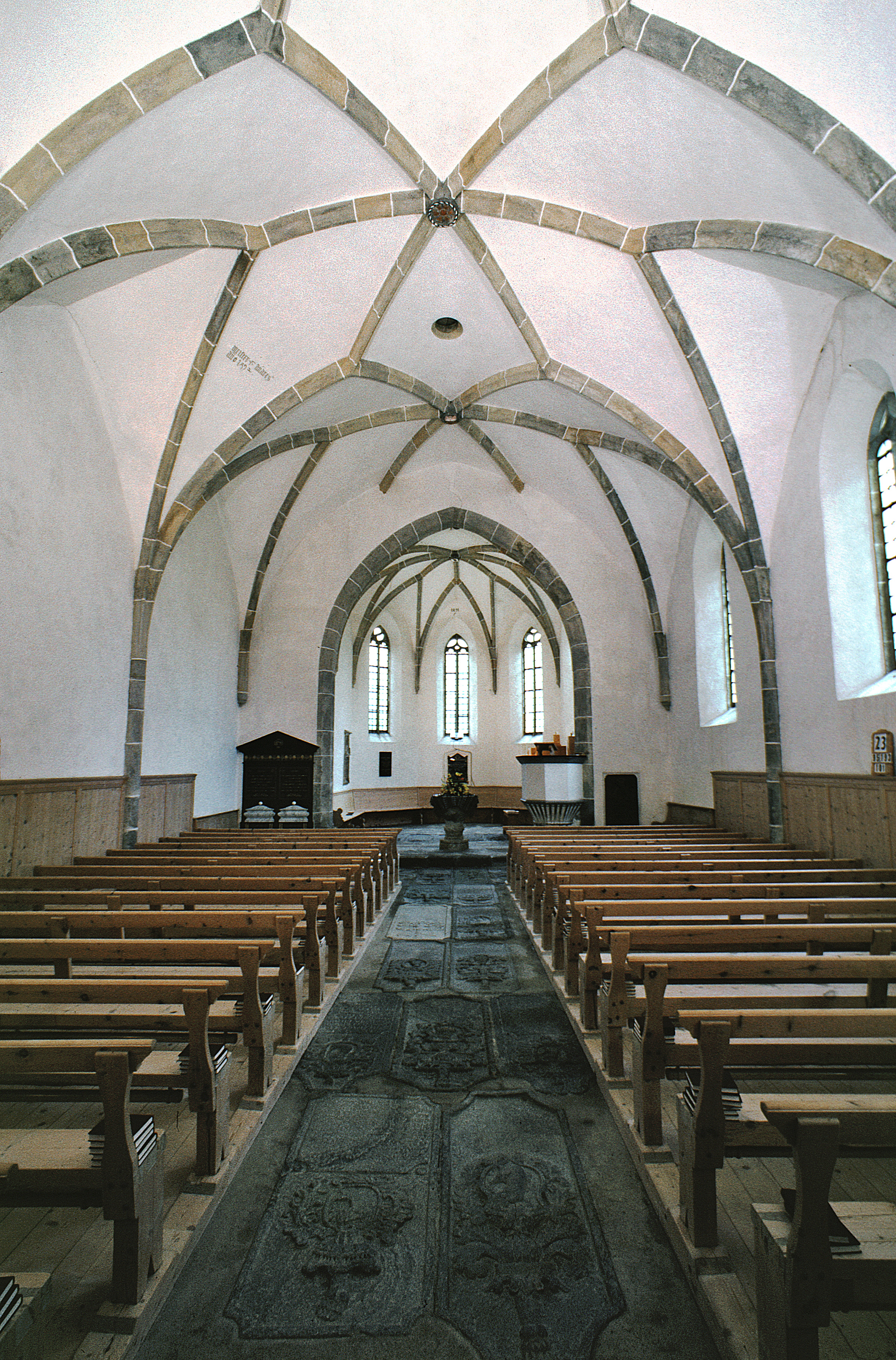 reformierte Kirche St. Peter in Samedan (Kanton Graubünden)